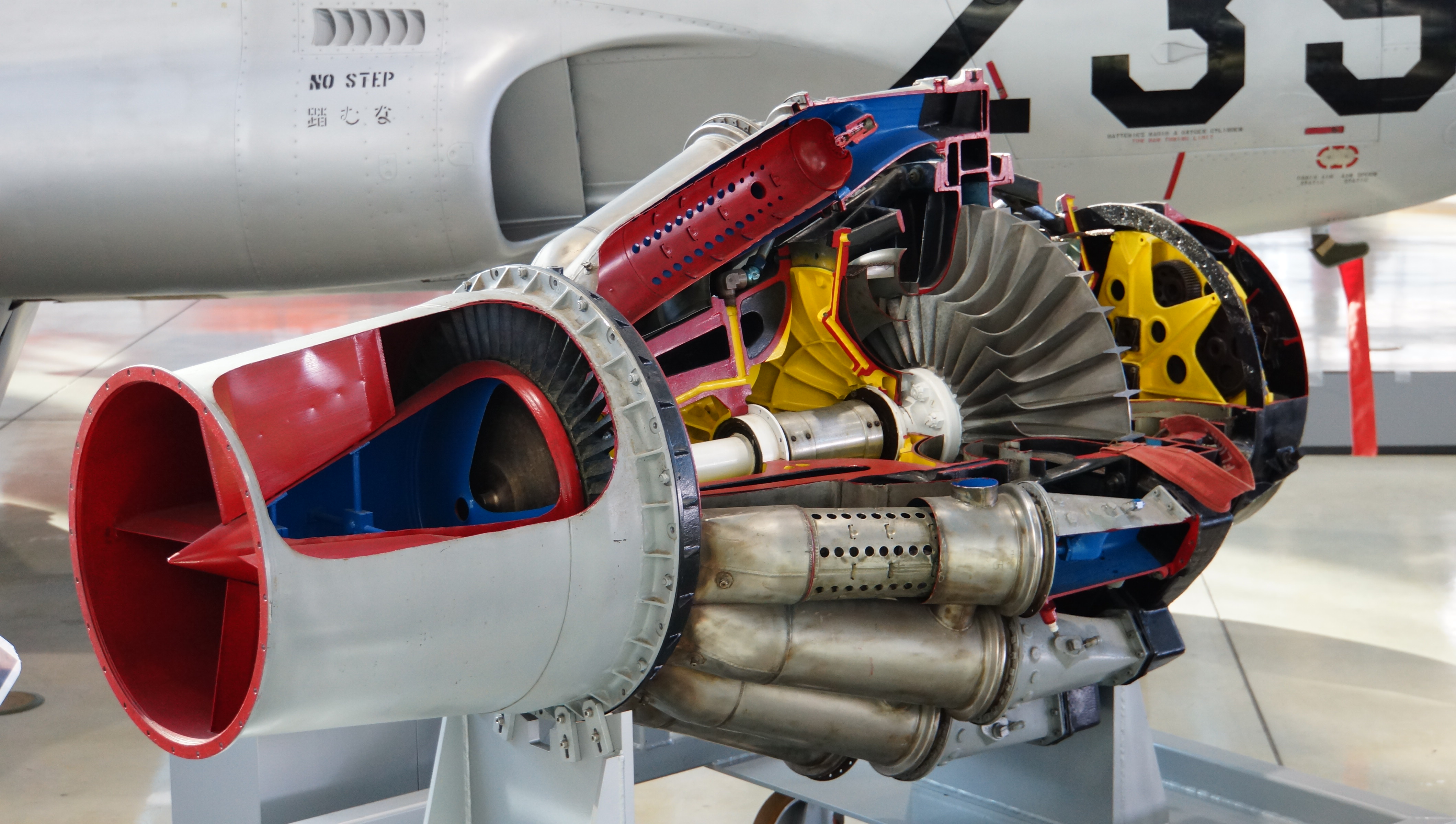 アリソン J33-A-15ターボジェット・エンジン（カットモデル） 右後部。2014年11月24日 航空自衛隊浜松基地広報館内にて。